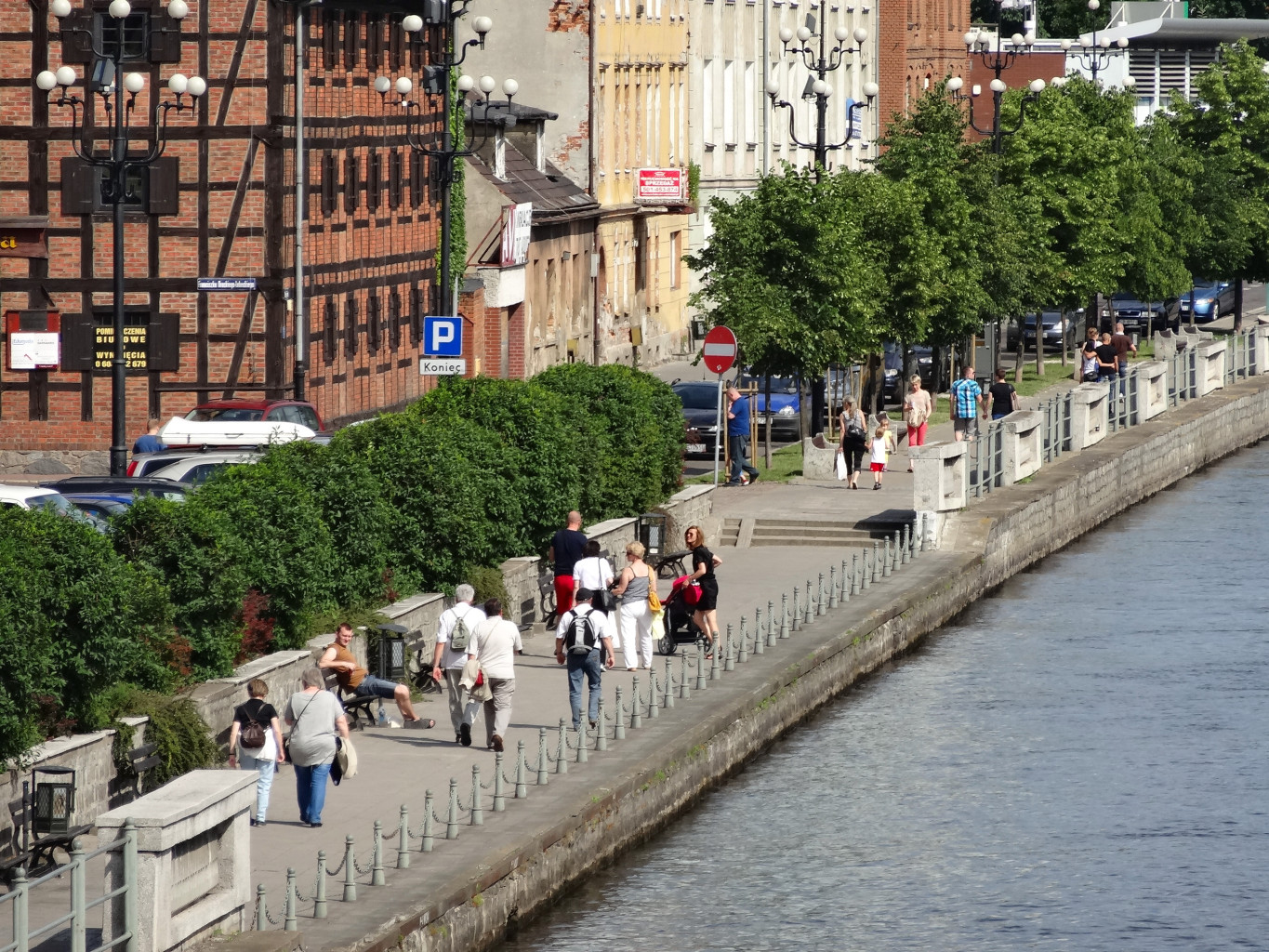 Północne nabrzeże Brdy w centrum Bydgoszczy - bulwar im. Zbigniewa Urbanyi